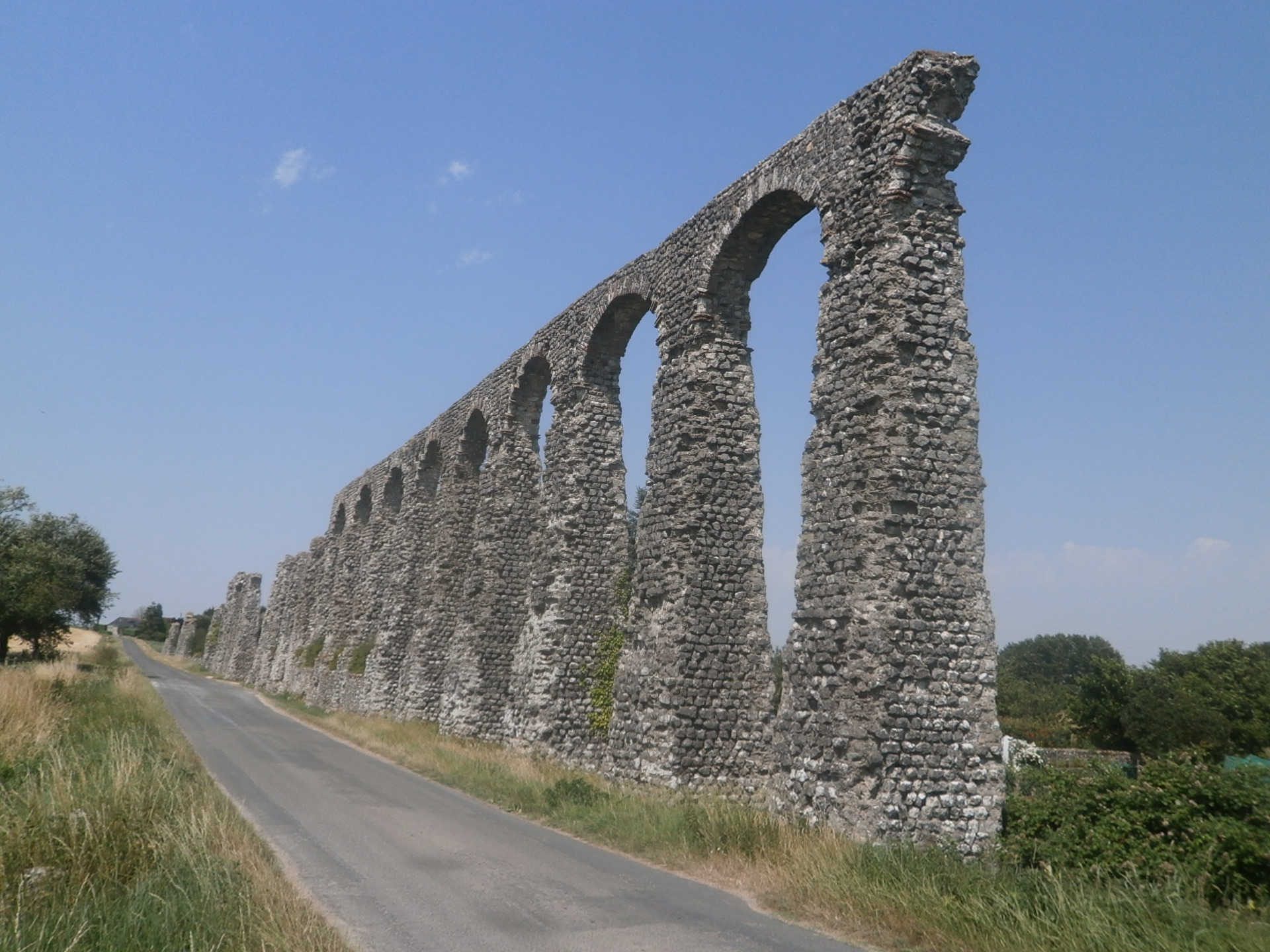 Vue d'ensemble des arcatures de l'aqueduc